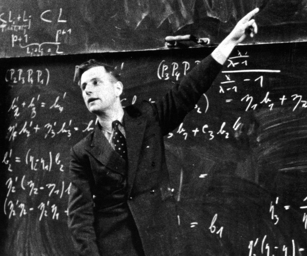 Gerhard Lustig bei einer Vorlesung am Mathematischen Institut der Universität Leipzig 1956/1957